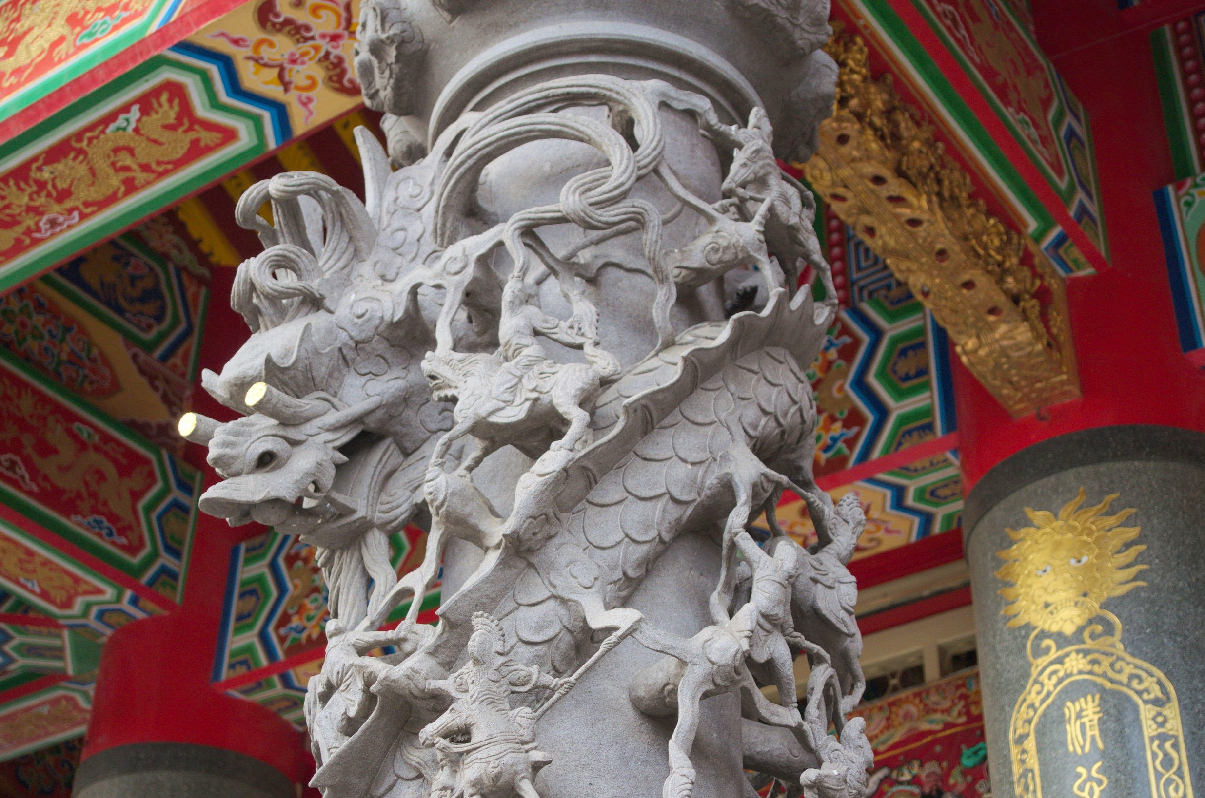 Xien Ten Gong / 聖天宮